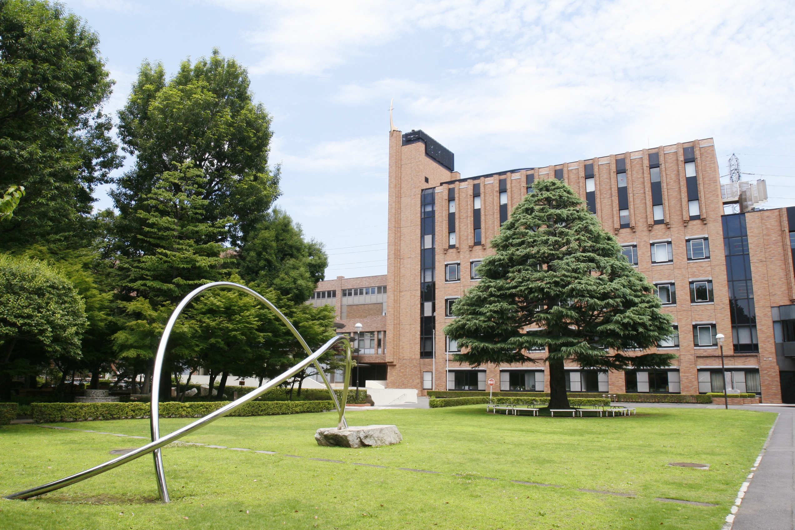 Campus